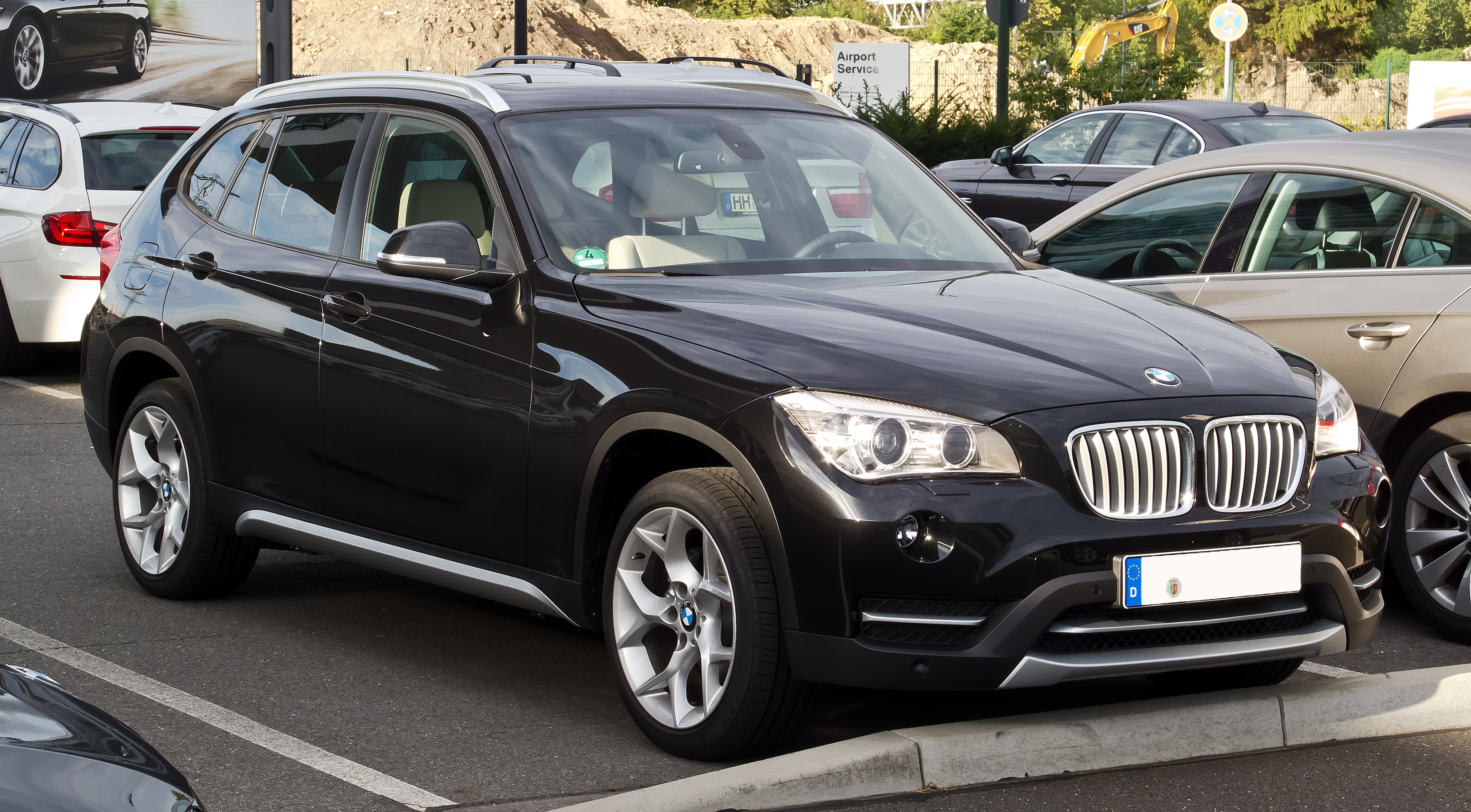 BMW X1 (E84, Facelift)